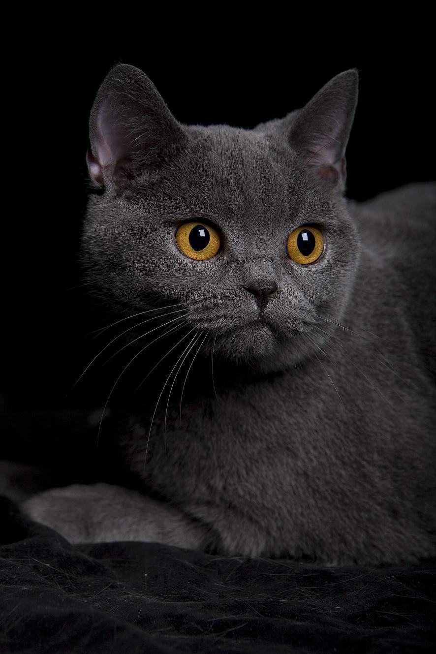 Een Brits korthaar van Cattery lamium